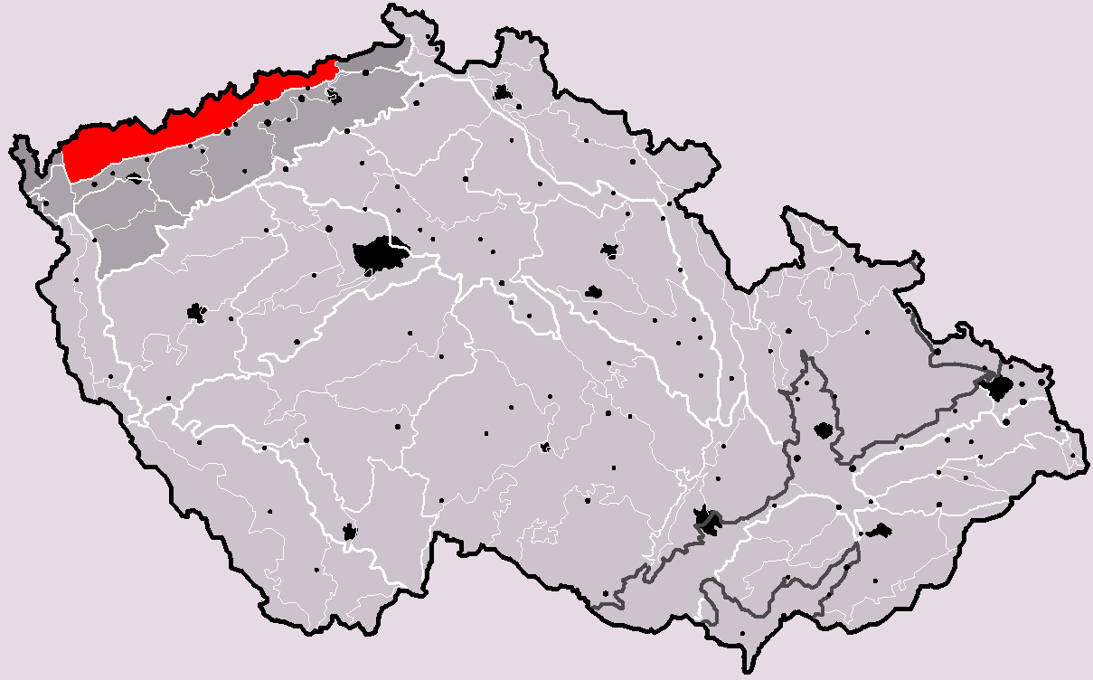 Poloha geomorfologického celku Krušné hory v rámci České republiky. Hercynský systém Hercynská pohoří I Česká vysočina I3 (III) Krušnohorská subprovincie I3A (IIIA) Krušnohorská hornatina I3A-2 (IIIA-2) Krušné hory